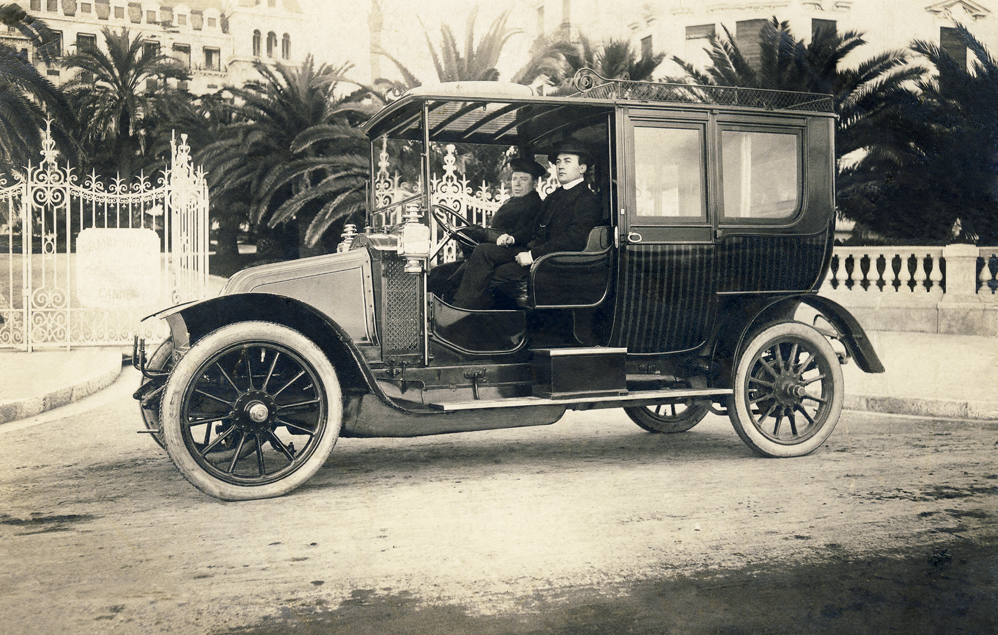 Il Detective Giuseppe Visco GIlardi a Cannes al termine di una operazione di servizio.